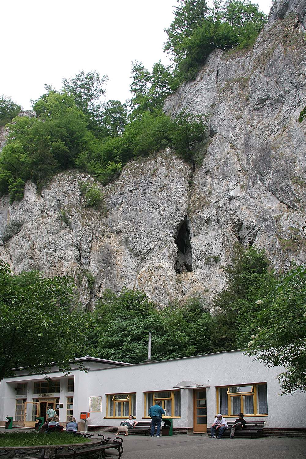 Vstupní budova u vhodu do Punkevních jeskyní